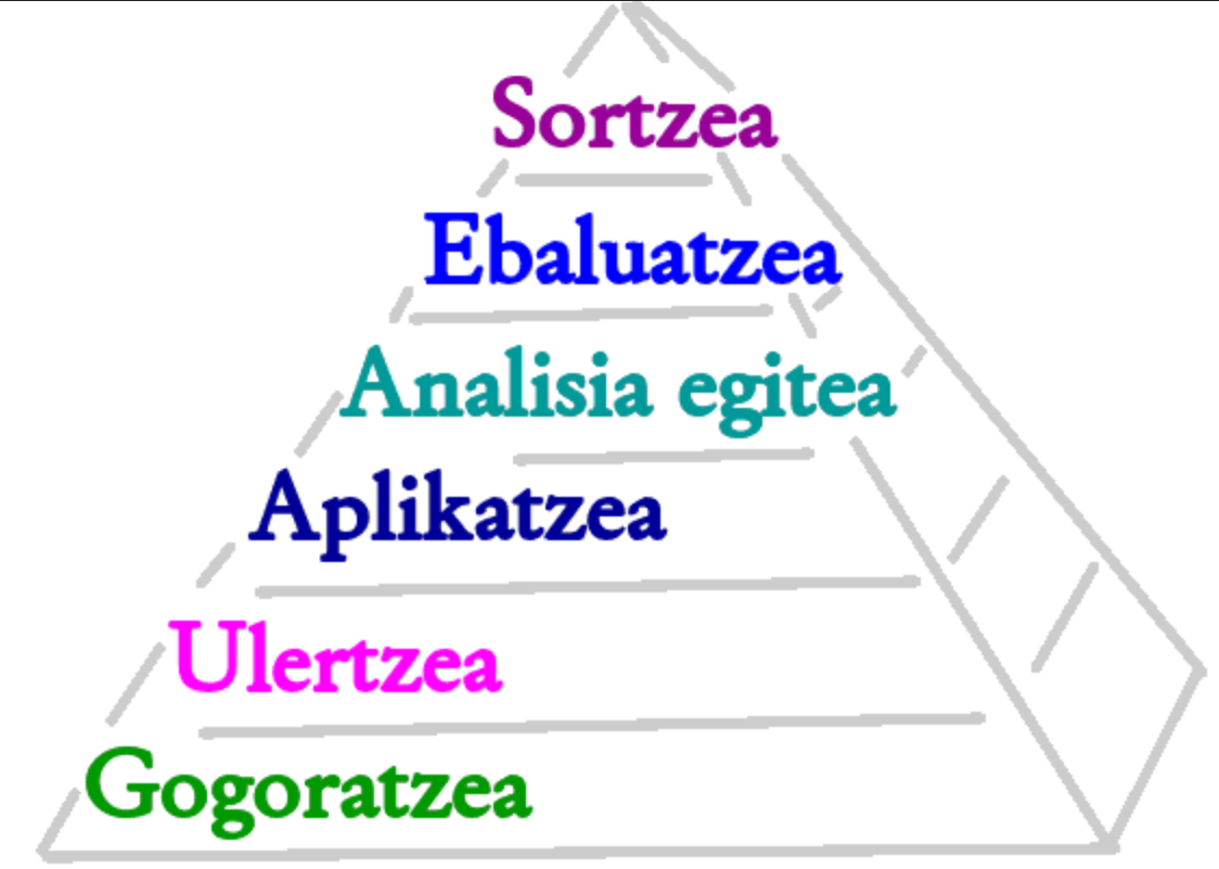 Bloom-en 2001. urteko ereduaren eskema